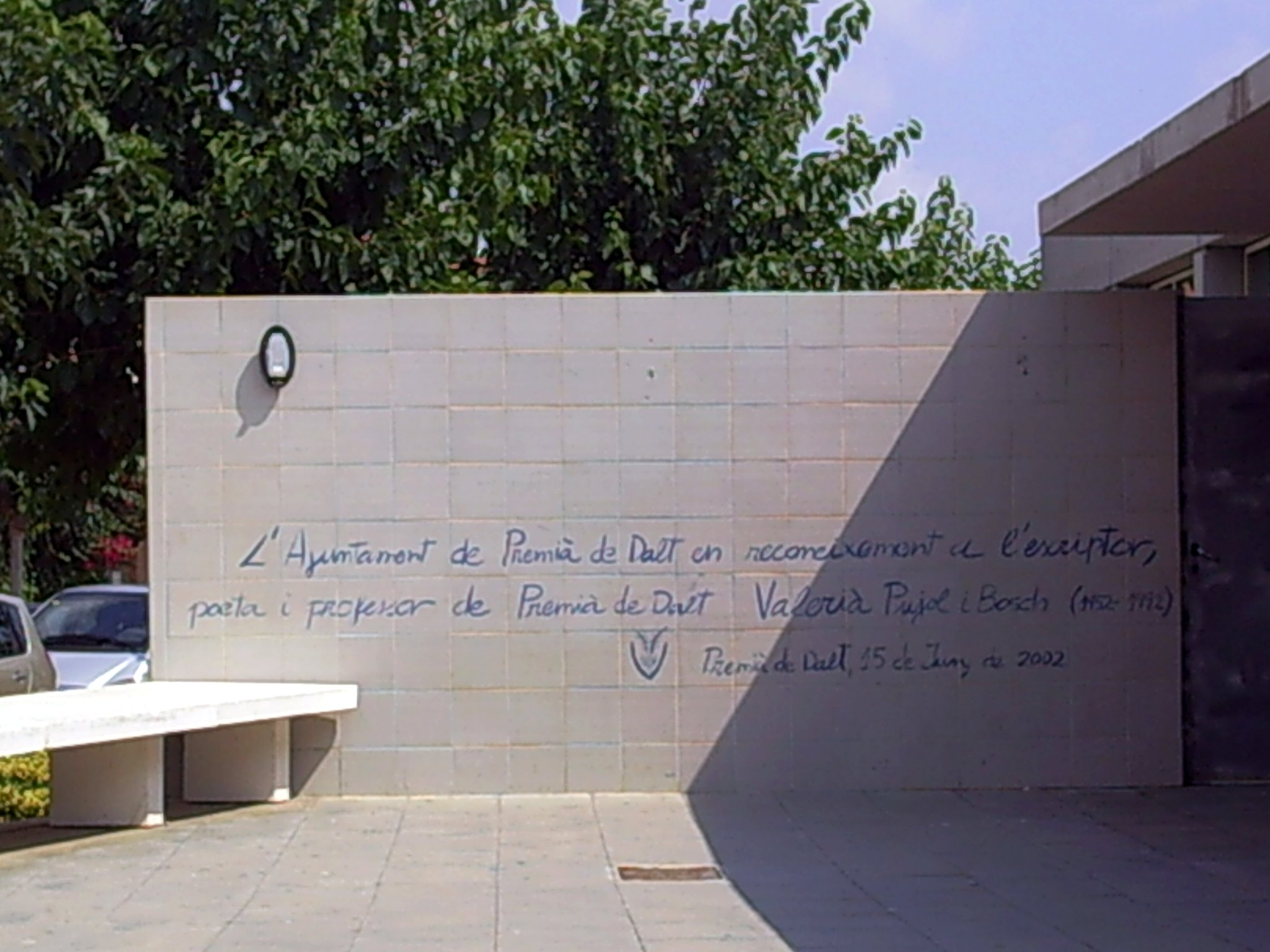 Mural en homenatge a Valerià Pujol i Bosch, escriptor, poeta i professor (1952-1992), a Premià de Dalt.